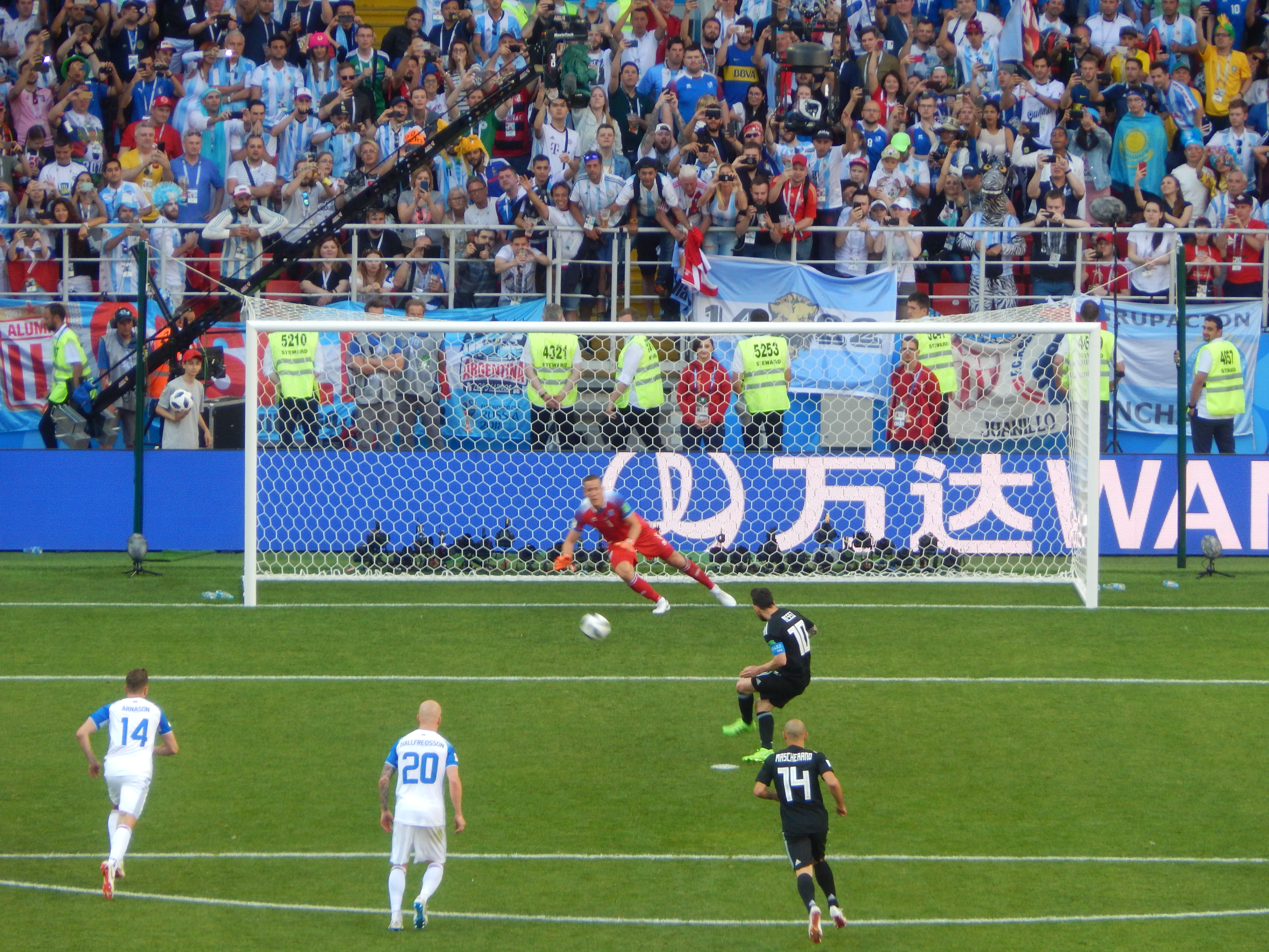 Лионель Месси не реализовывает одиннадцатиметровый удар (вратарь)